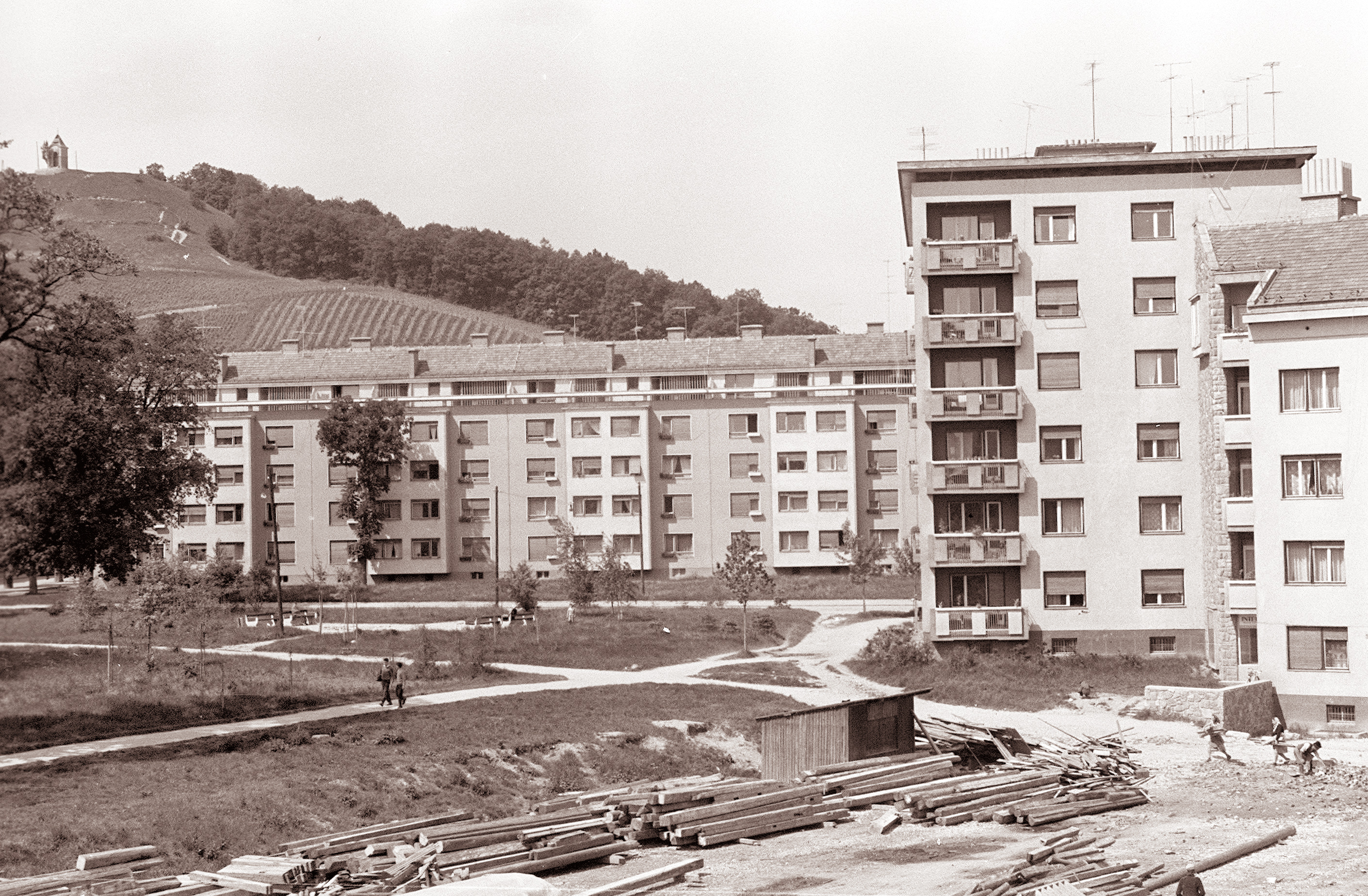 Trg Borisa Kidriča